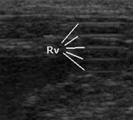 Rv- Reverberationen, ausgelöst durch ungenügende Ankopplung der Ultraschallsonde